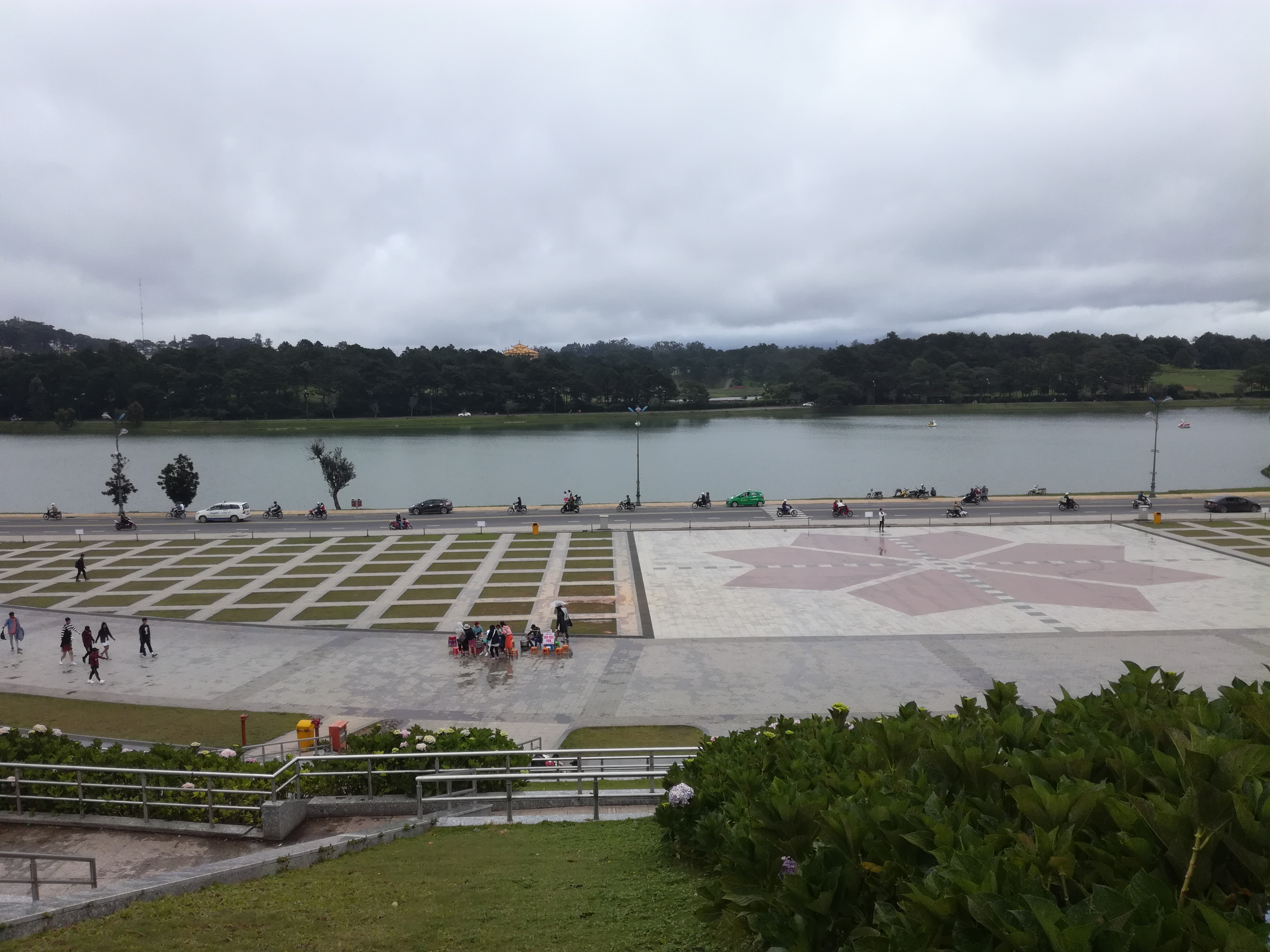 Lâm Viên square (August 7, 2018) (43968583912).jpg